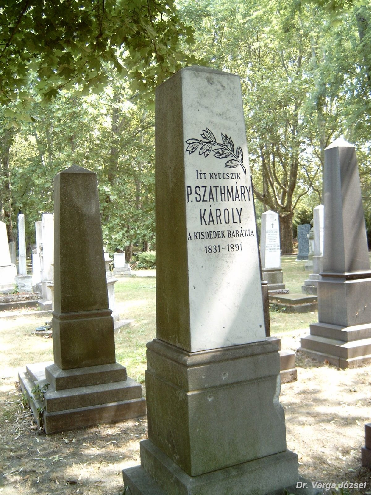 Szathmáry Károly, P. Szathmáry (Szilágysomlyó, 1831. júl. 24. – Bp., 1891. jan. 14.) író, tanár sírja Budapesten. Kerepesi temető: 34/1-1-11.